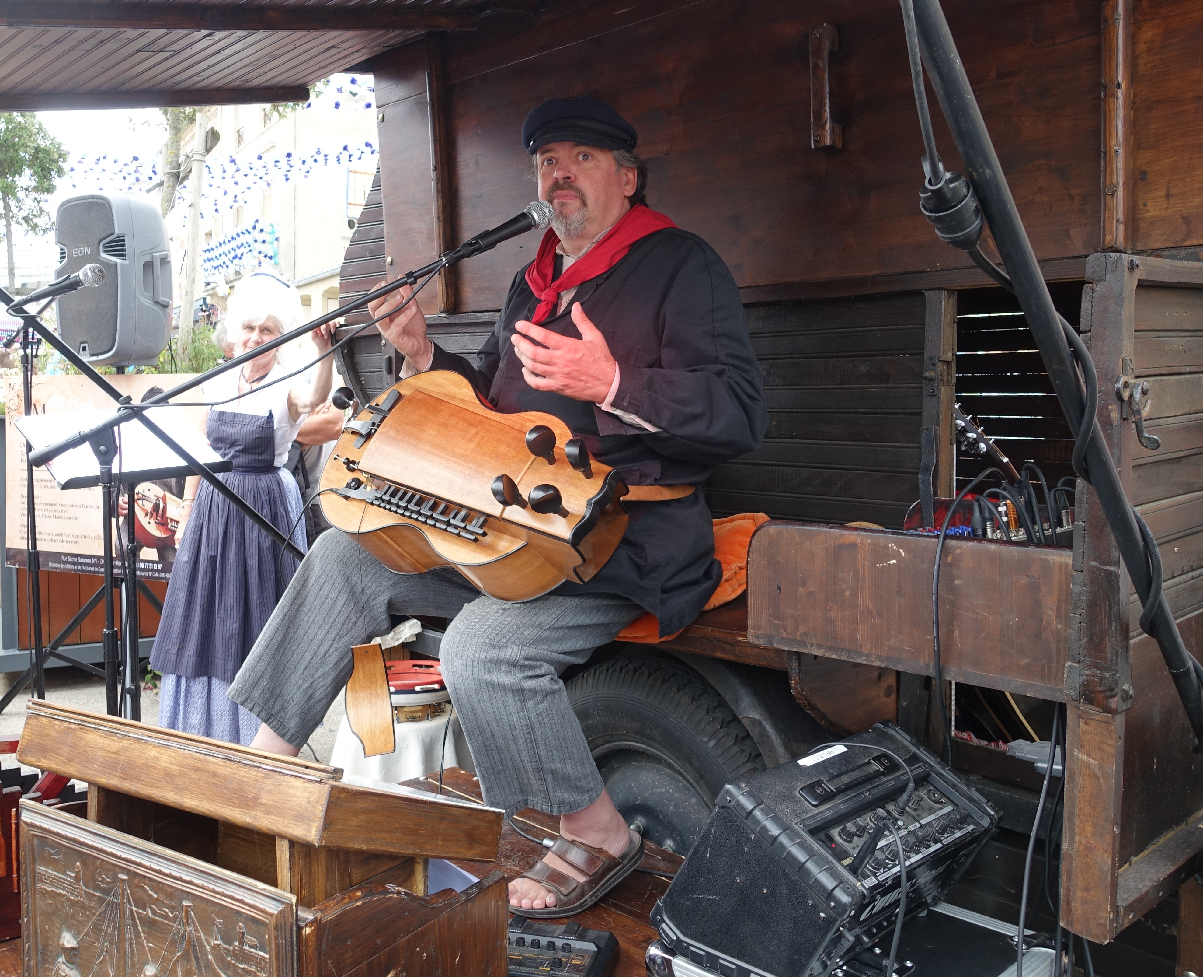 Port en Bessin, tijdens het feest Benediction de la Mer